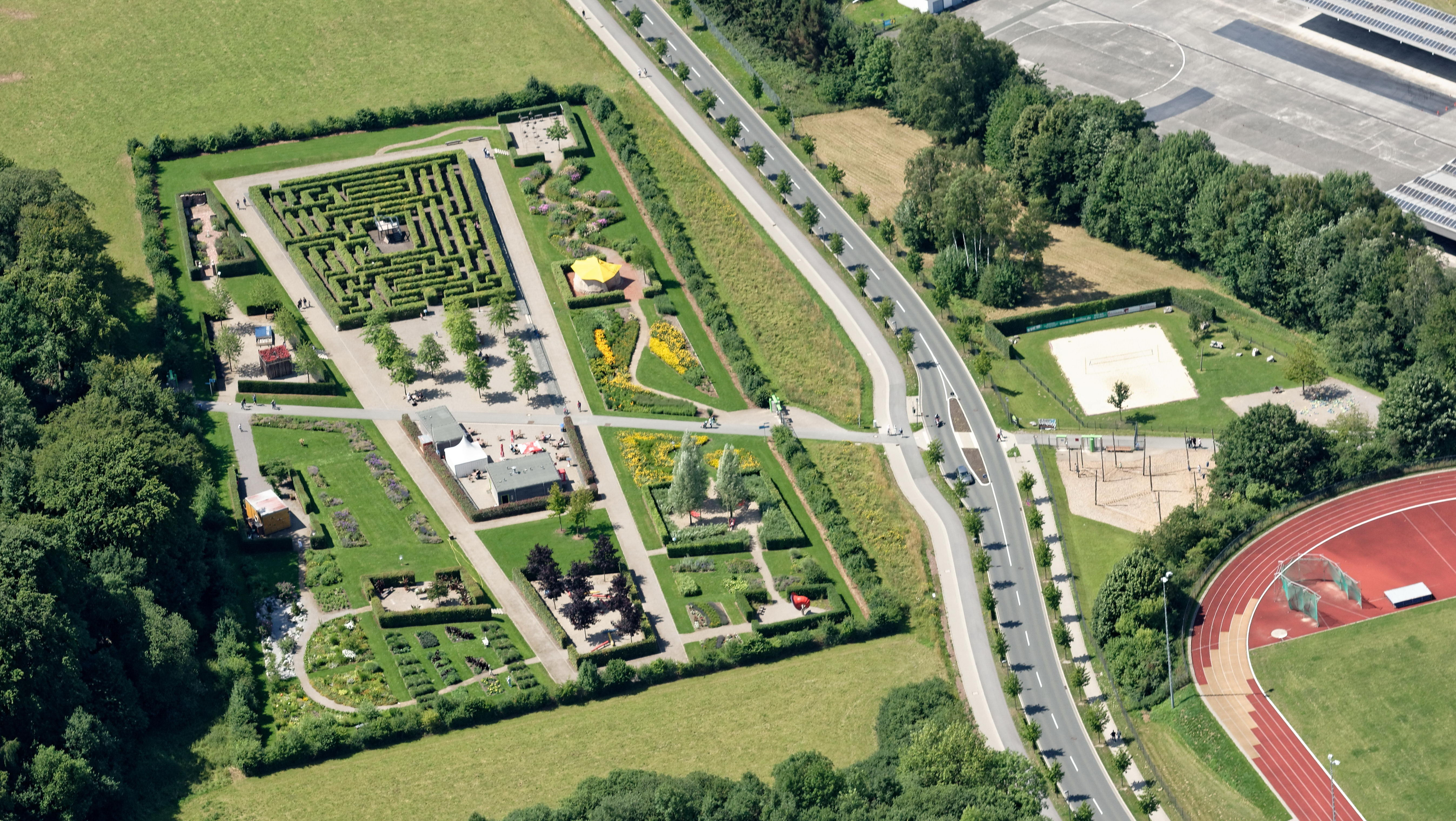 Fotoflug Sauerland West. Park der Sinne (links im Bild), Beachvolleyballfeld und Slacklineparcours. Südwestlicher Teil des Sauerlandparks) in Hemer, Deilinghofer Straße. The making of this document was supported by the Community-Budget of Wikimedia Germany.